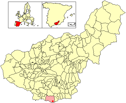 Situación de la localidad de Carchuna (en la entidad local autónoma de Carchuna-Calahonda, municipio de Motril) respecto a la provincia de Granada, en España.